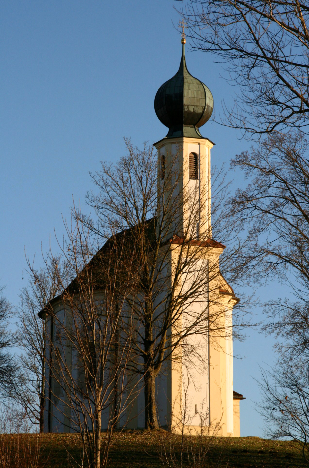 Die Wallfahrtskirche Maria Schnee in Kirchbrunn (Gemeinde Heldenstein, Landkreis Mühldorf am Inn, Oberbayern). Schöner spätbarocker Zentralbau der Jahre 1760-62. Das kleine Gotteshaus befindet sich in reizvoller landschaftlicher Lage.